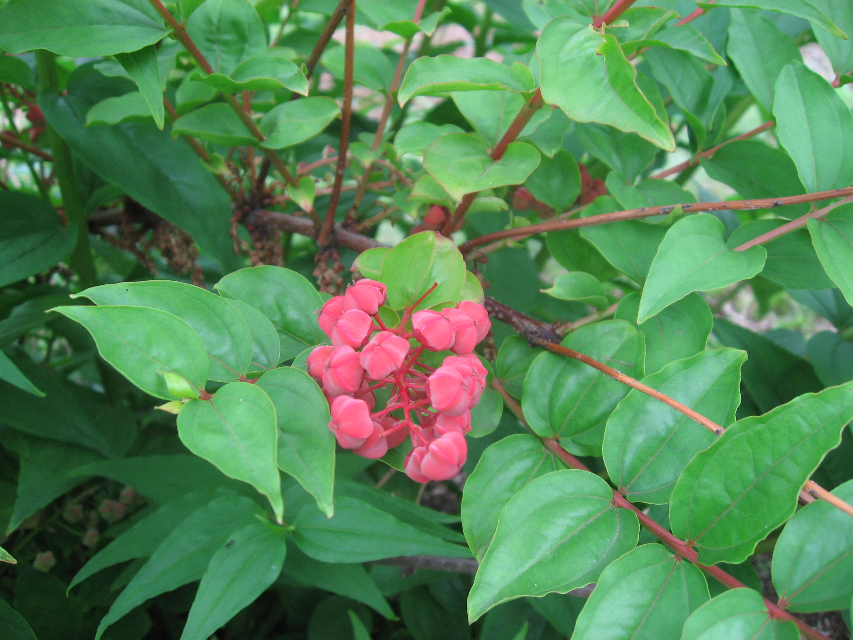 Coriaria japonica